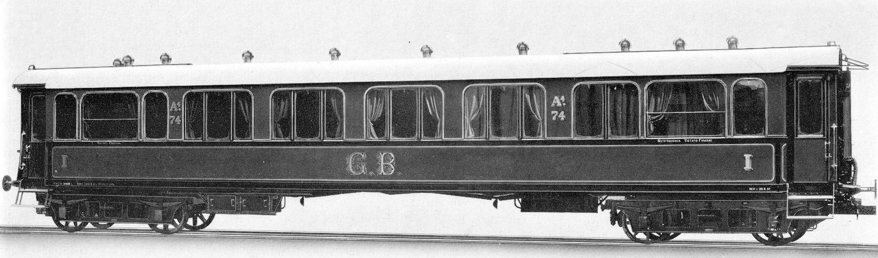 Von der Firma Van der Zypen & Charlier in Köln-Deutz gelieferter Wagen der Typs A4. Das Fahrzeug zählte zu den ersten Ganzstahl-Reisezugwagen des Kontinents. Die aussen mutmaßlich dunkelblau gestrichenen Wagen besaßen geschlossene Plattformen, Faltenbalg-Übergänge und Wiegen-Drehgestelle. Auffallend war die luxuriöse Innenausstattung mit schweren Plüschfauteuils, grosszügiger Beinfreiheit, dreiteiligen Aussichtsfenstern, Klapptischen und elektrische Beleuchtung.